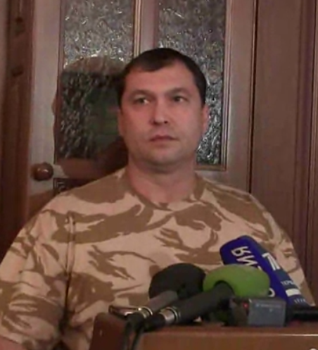 Photographie de Valéri Bolotov